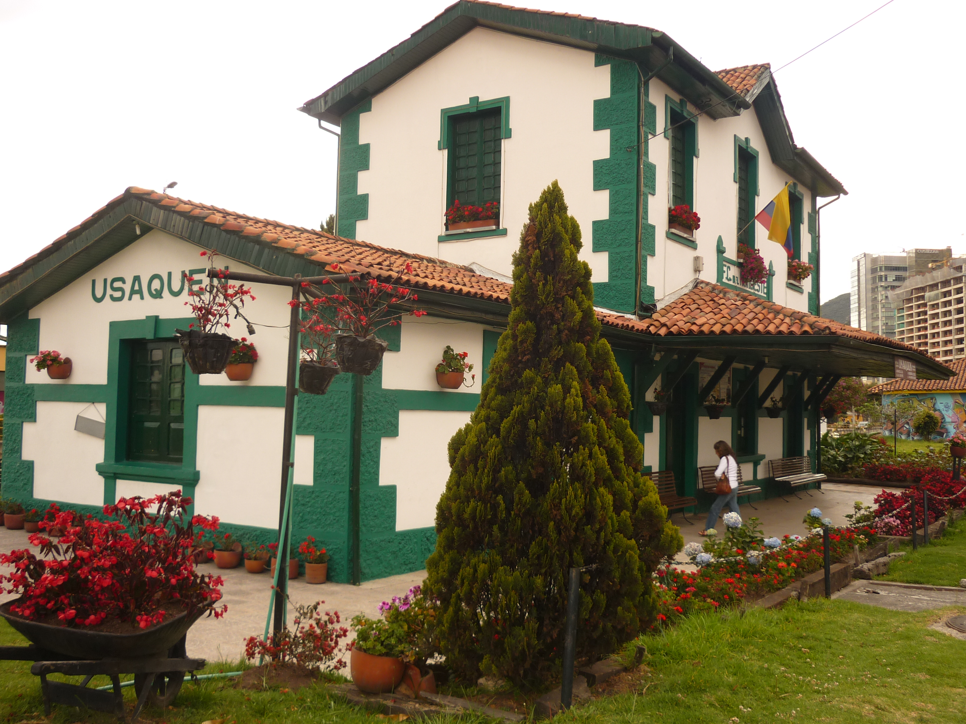 Ferrocarril de la Sabana, Estación Usaquén, Bogotá, Colombia. Carrera 9 - Calle 110.